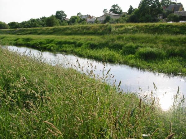 Włodawka we Włodawie. Autor zdjęcia: Piotr Trochymiak aka Pepson.